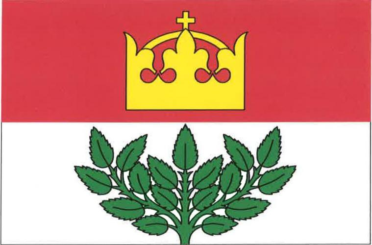 Zachrašťany vlajka